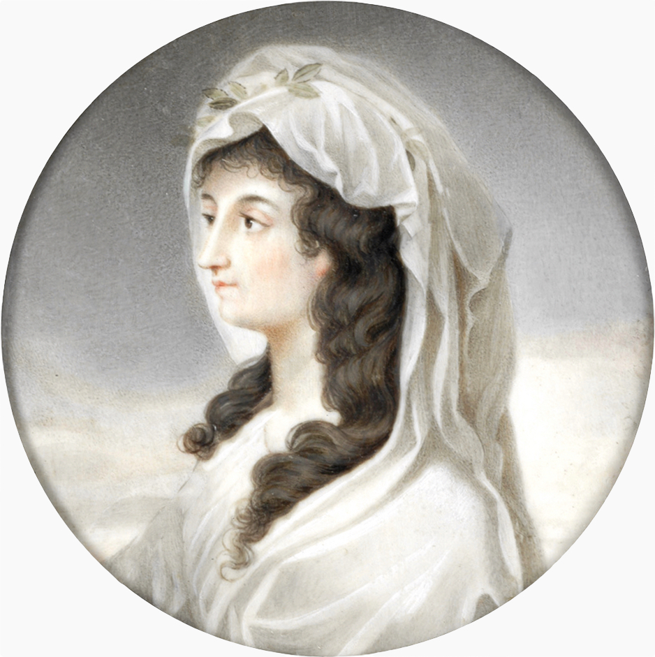 Portrait en médaillon de Fanny de Beauharnais en buste de profil trois-quart vers la droite, portant un voile sur la tête avec un rameau d'olivier.